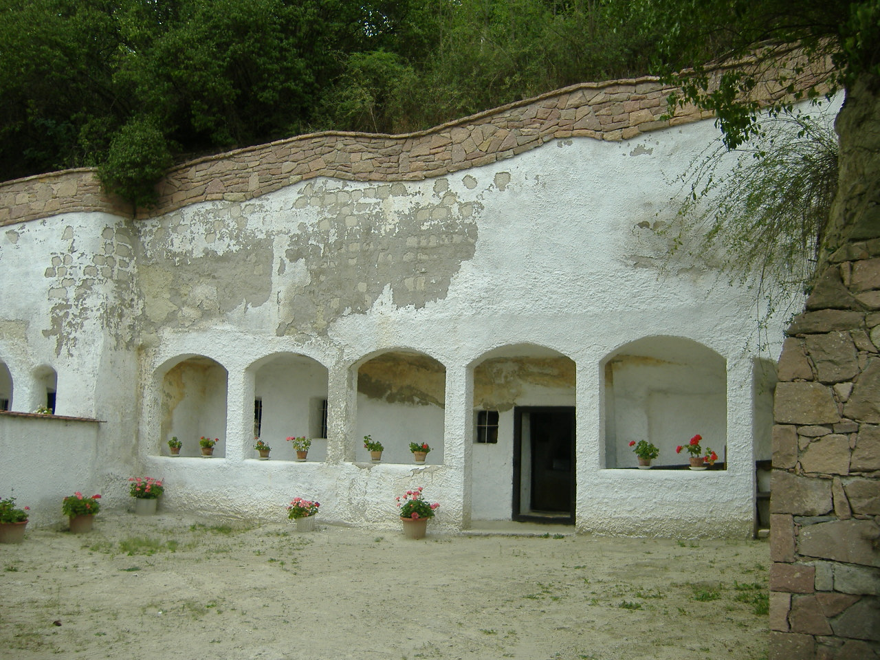 Szomolya, tájház (Borsod-Abaúj-Zemplén megye)